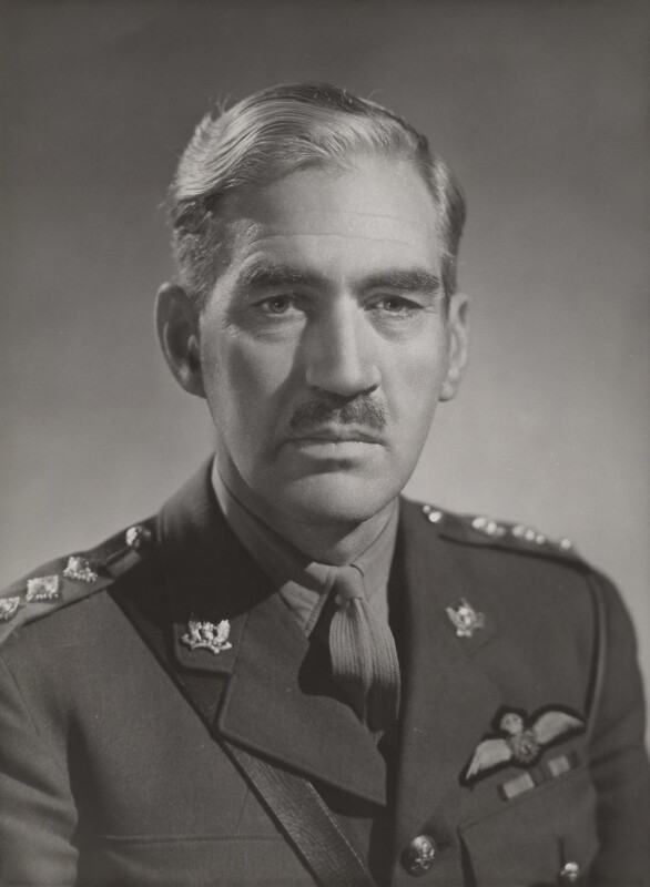 James Orr MacAndrew